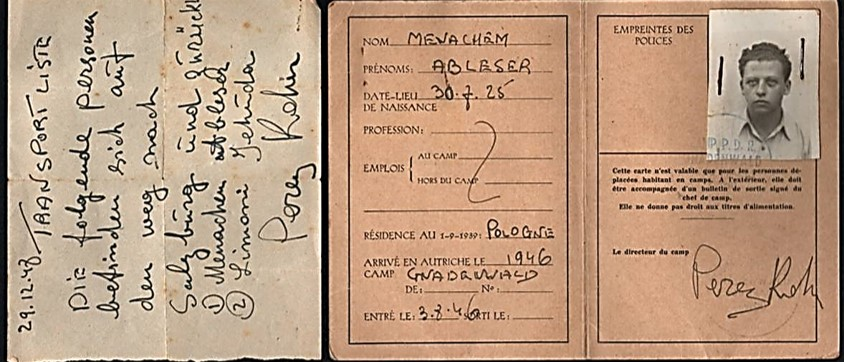 מסמכים מזויפים של הפליט מנחם אבלייזר, בהם השתמש צבי כרמל בעת הביקור במחנות הפליטים היהודיים באוסטריה, בנובמבר 1948